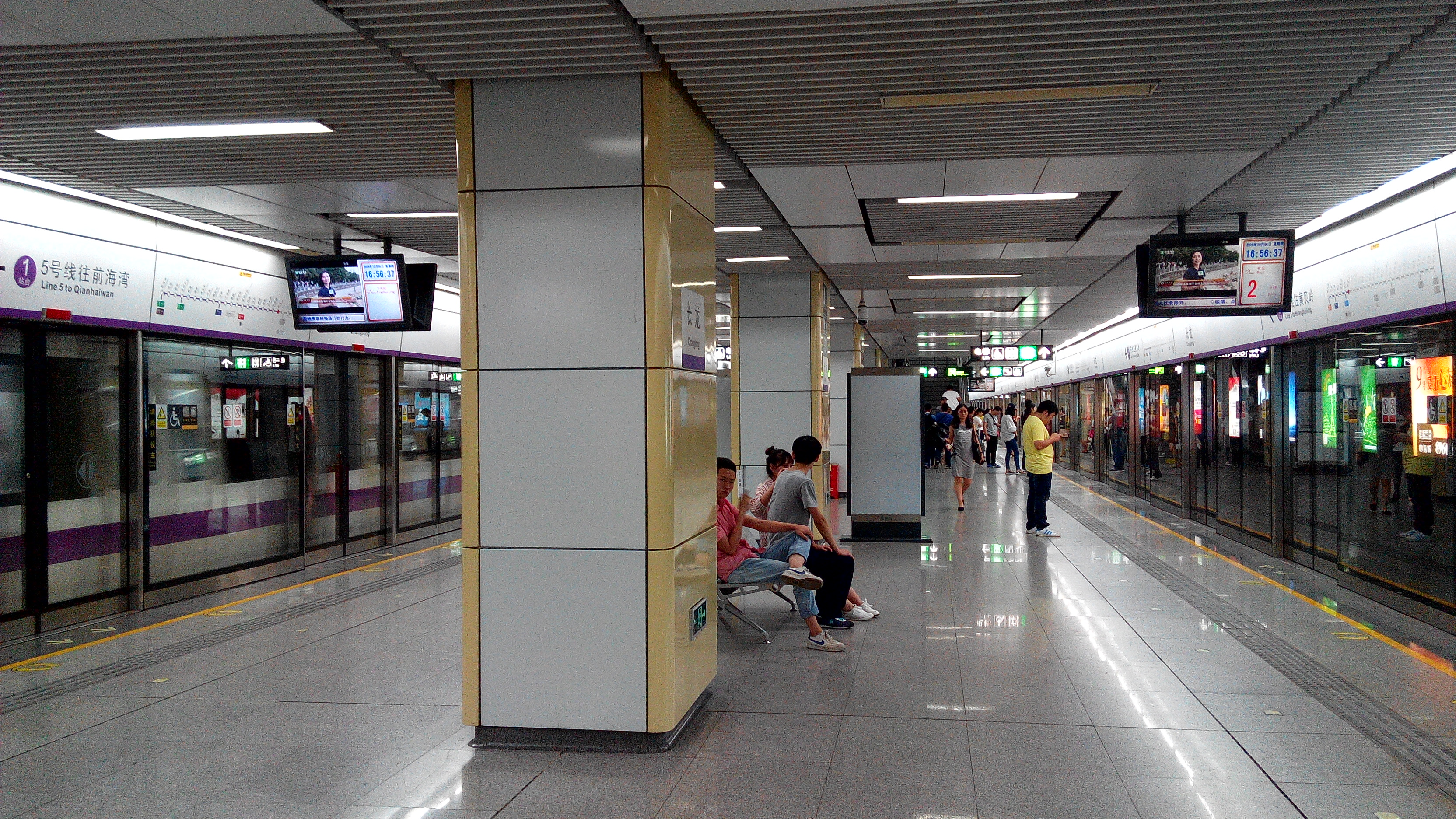 深圳地铁5号线长龙站站台